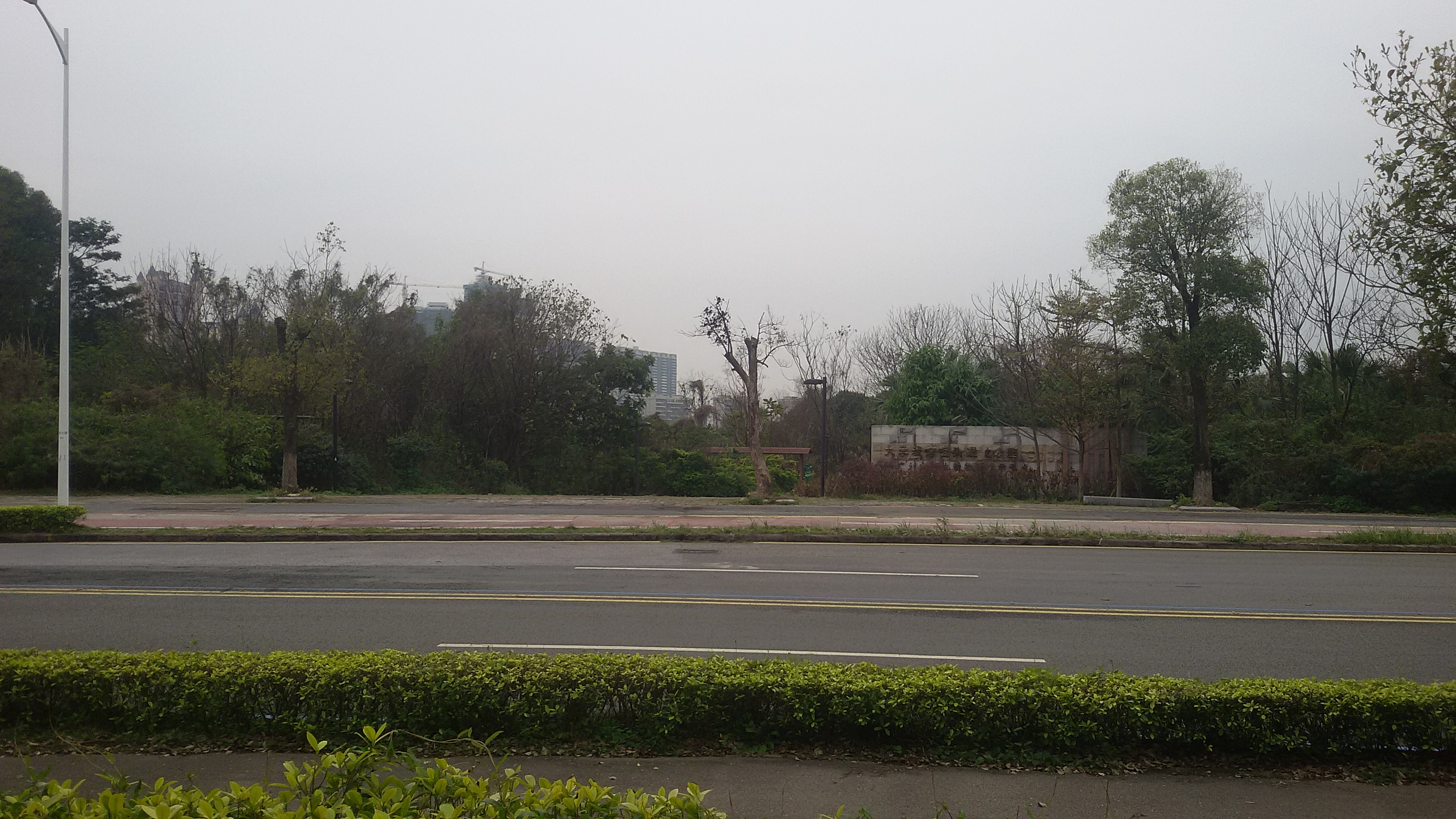 粵語: 灣咀頭濕地公園